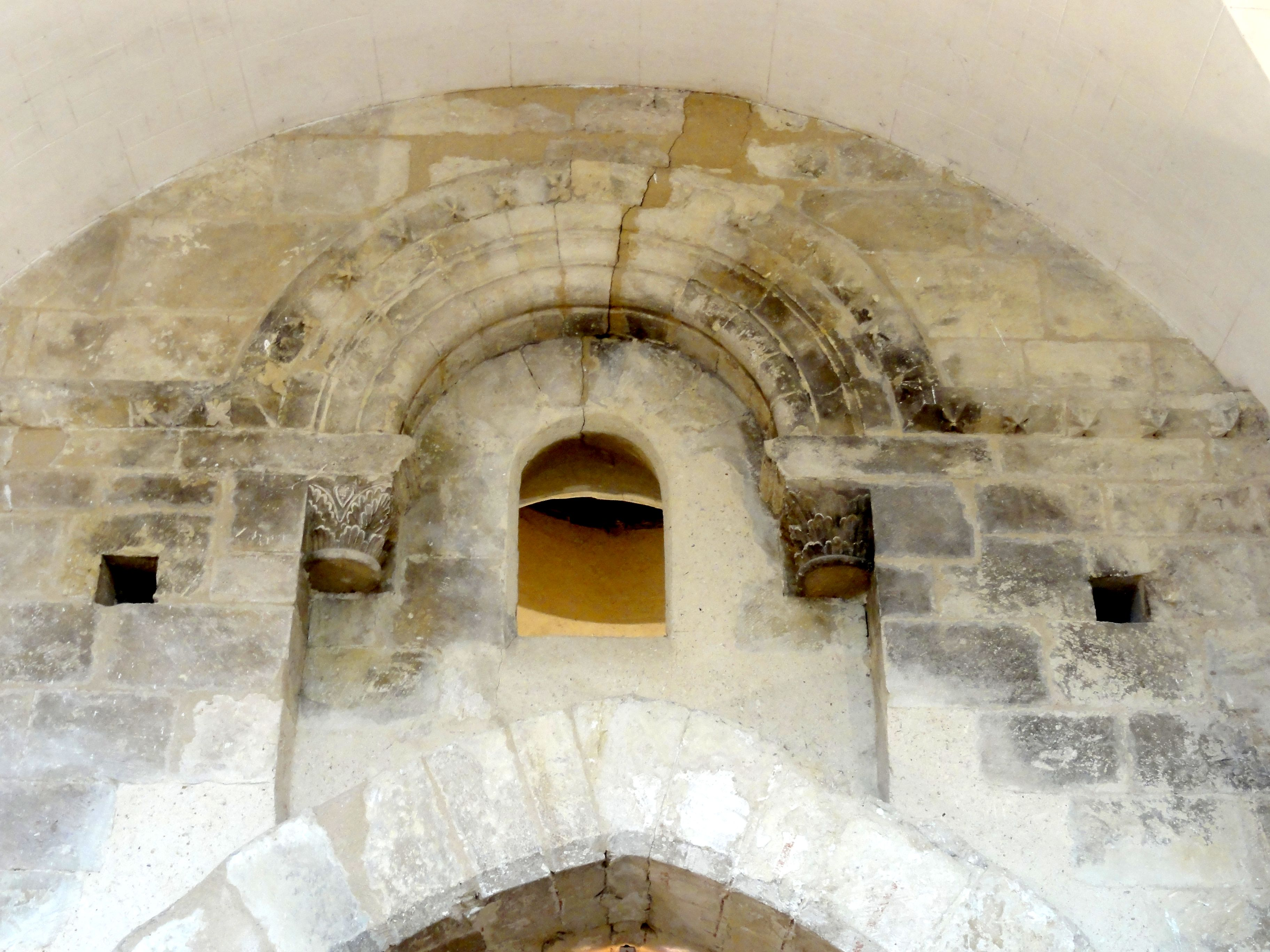 Collatéral sud (faux croisillon), vue sur une fenêtre avec archivolte décorée sur la base du clocher.